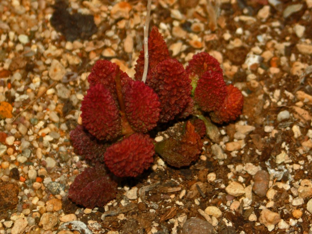 Adromischus marianae herrei at the botanical garden of Villa Durazzo-Pallavicini, Genova Pegli